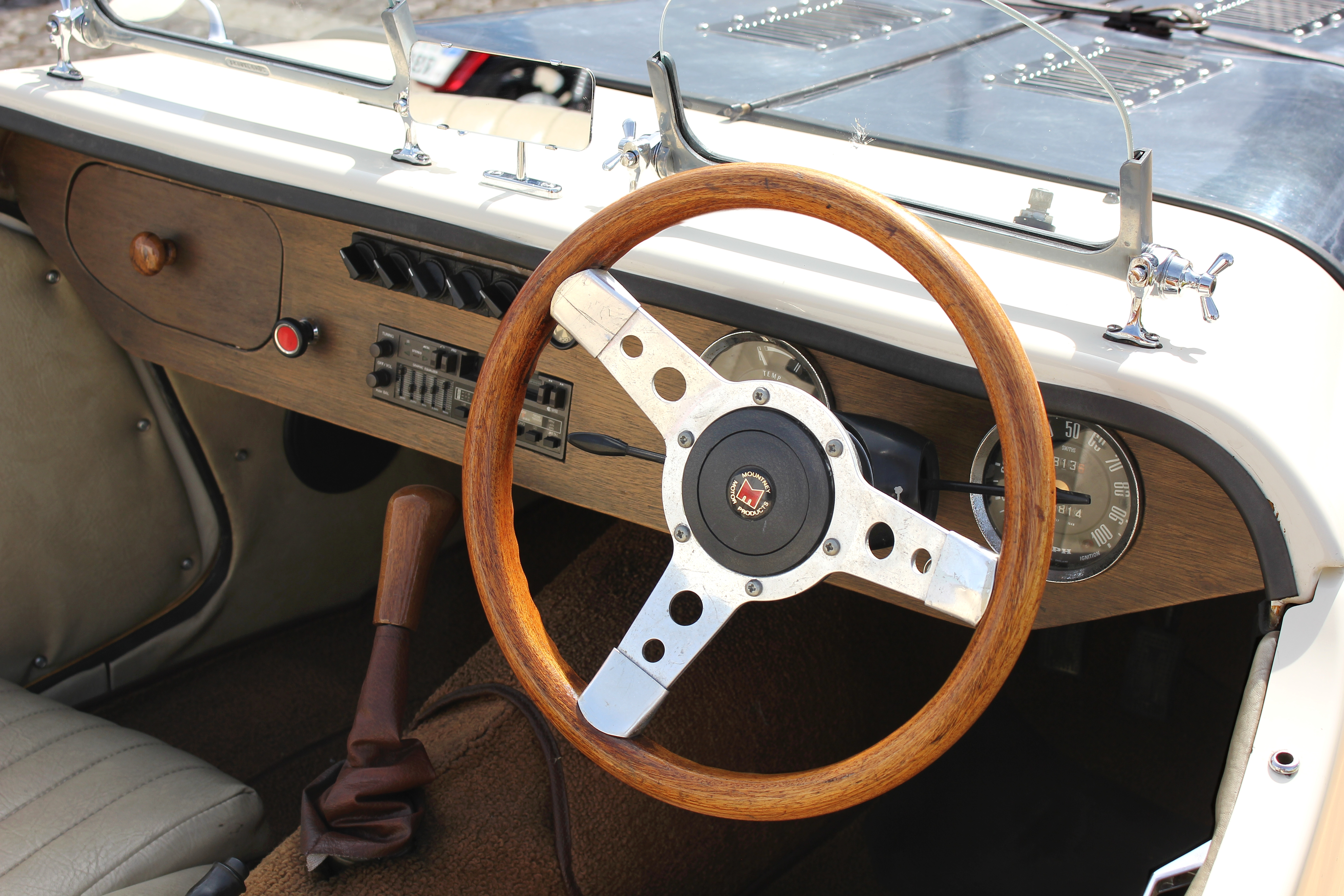 Moss Malvern, Baujahr 1970, Sportwagen auf der Basis des Thriumph Herold, Motor 1,2 Liter, beim Oldtimertreffen des Automobilclubs Mülheim-Kärlich. 370 Fahrzeuge wurden gebaut, auch mit anderer Motorisierung. (Kennzeichen verändert)